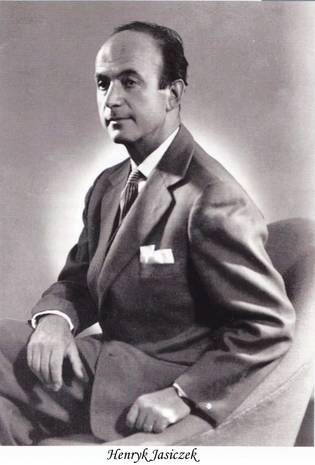 Henryk Jasiczek